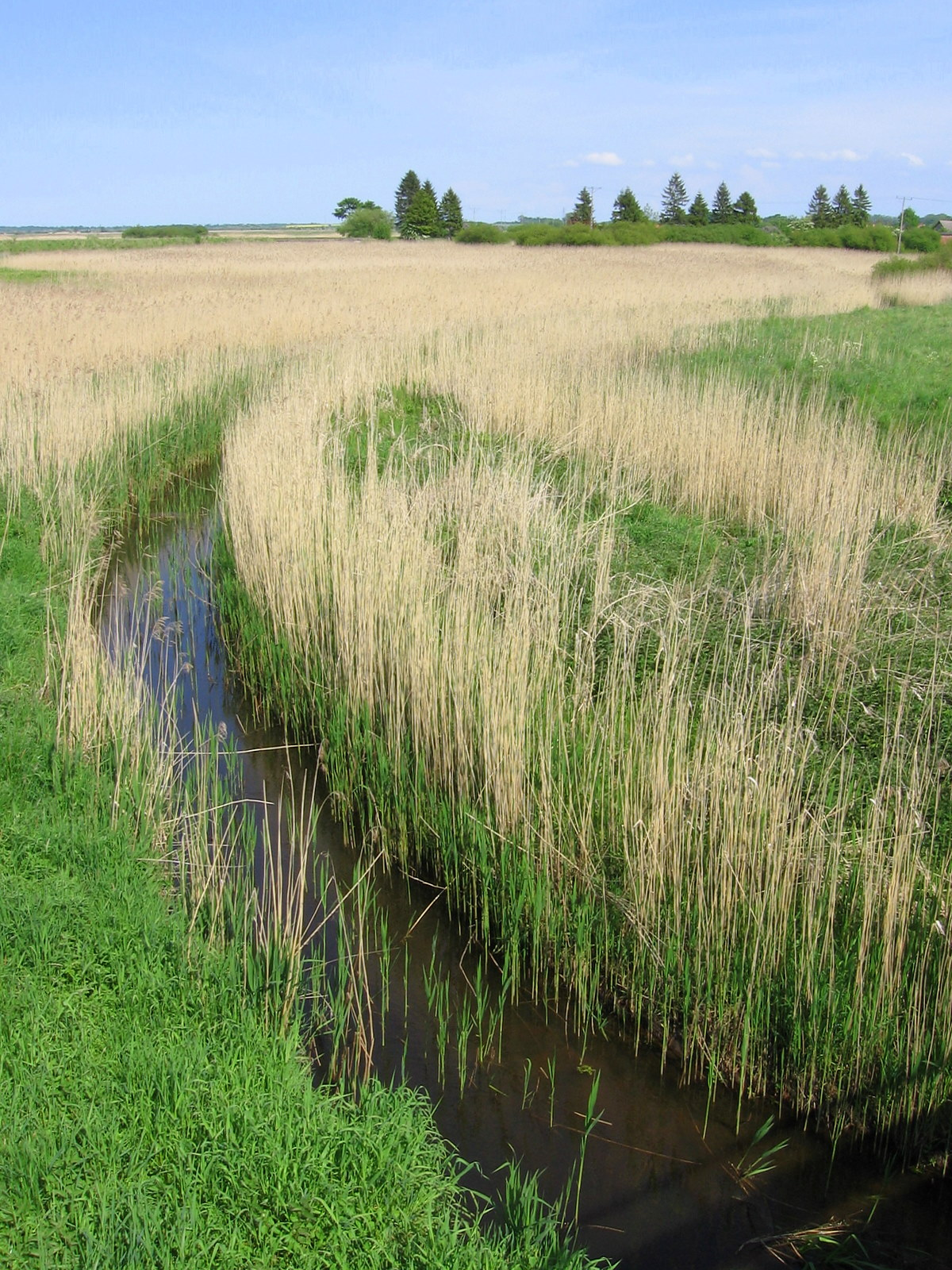 Struga Sarnia przy drodze wojewódzkiej nr 109 (woj. zachodniopomorskie)